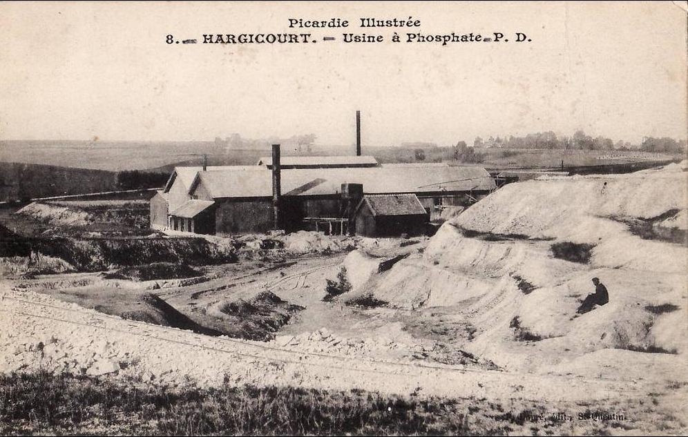 L'usine de phosphate d'Hargicourt.